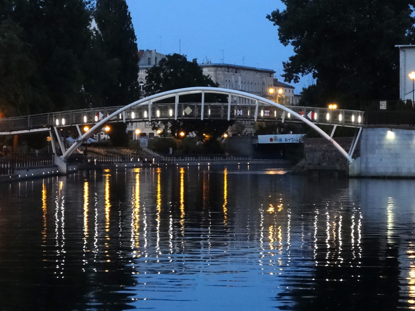 Kładka dla pieszych łącząca Wyspę Młyńską z Operą Nova i bulwarami nad Brdą